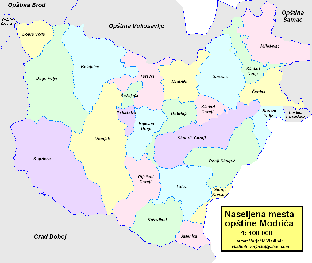 Opština Modriča